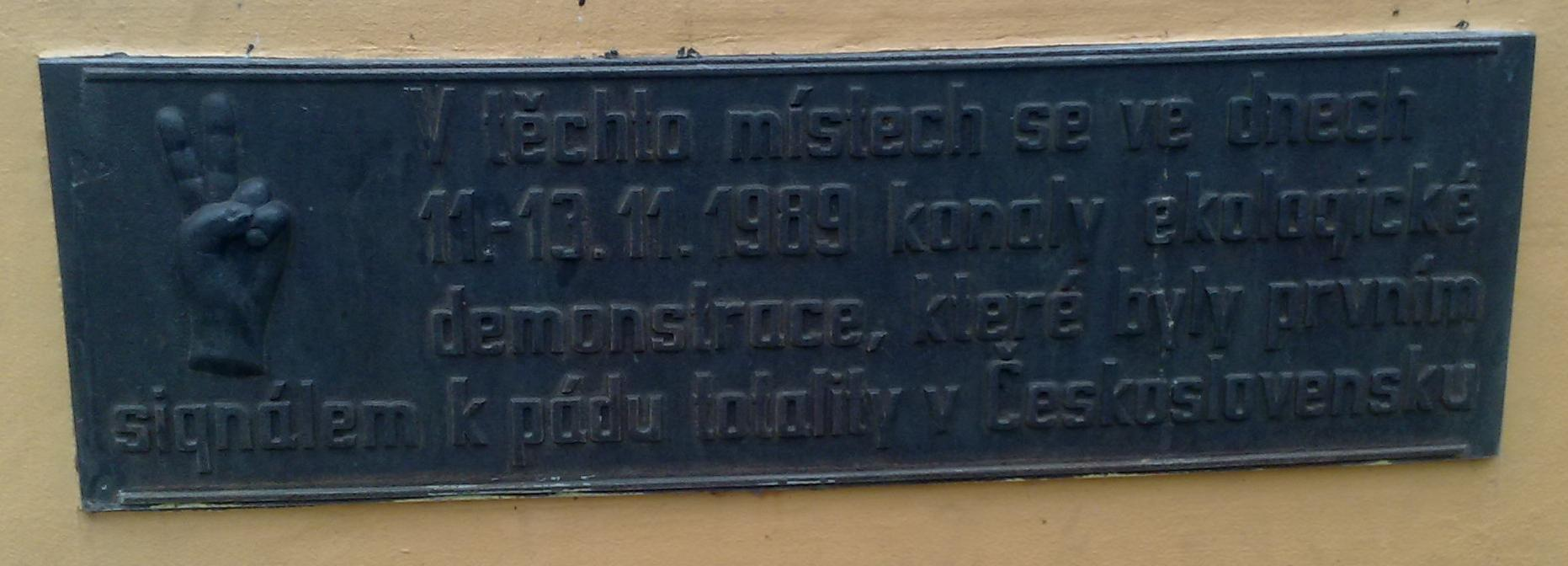 "Další potlačené demonstrace se konaly 21. srpna a 28. října 1989. O několik dní později se protesty přesunuly do Teplic, kde během dní 10., 11. a 14. listopadu 1989 došlo k řadě ekologických demonstrací.[8] Jen den před 17. listopadem proběhla studentská demonstrace v Bratislavě." A tato kašna je právě místem, kde tyto Teplické demonstrace proběhly. Podívejte se na detail pro bližší informace.